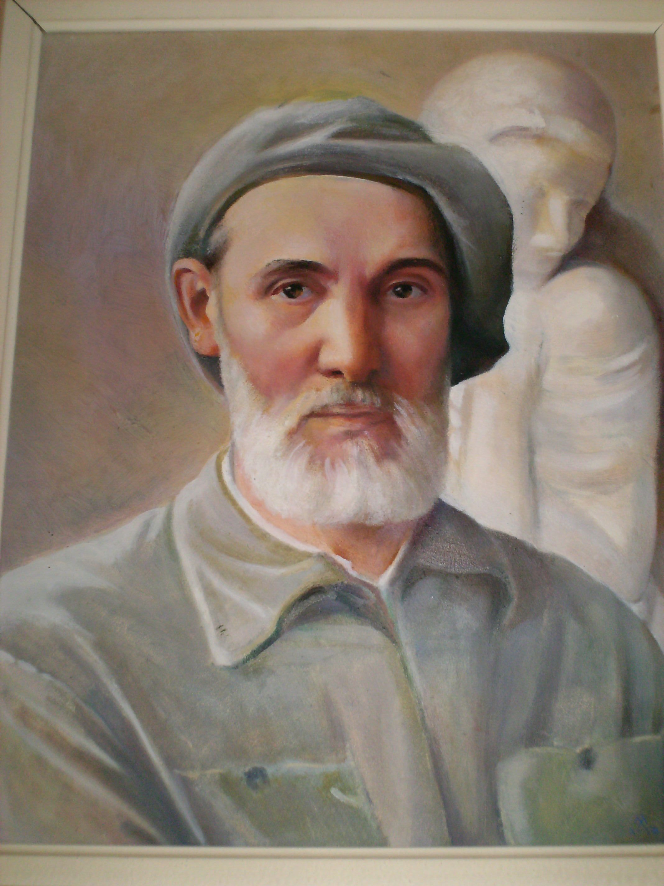 Mau Xhrouet, auto-portrait, ca. 1960